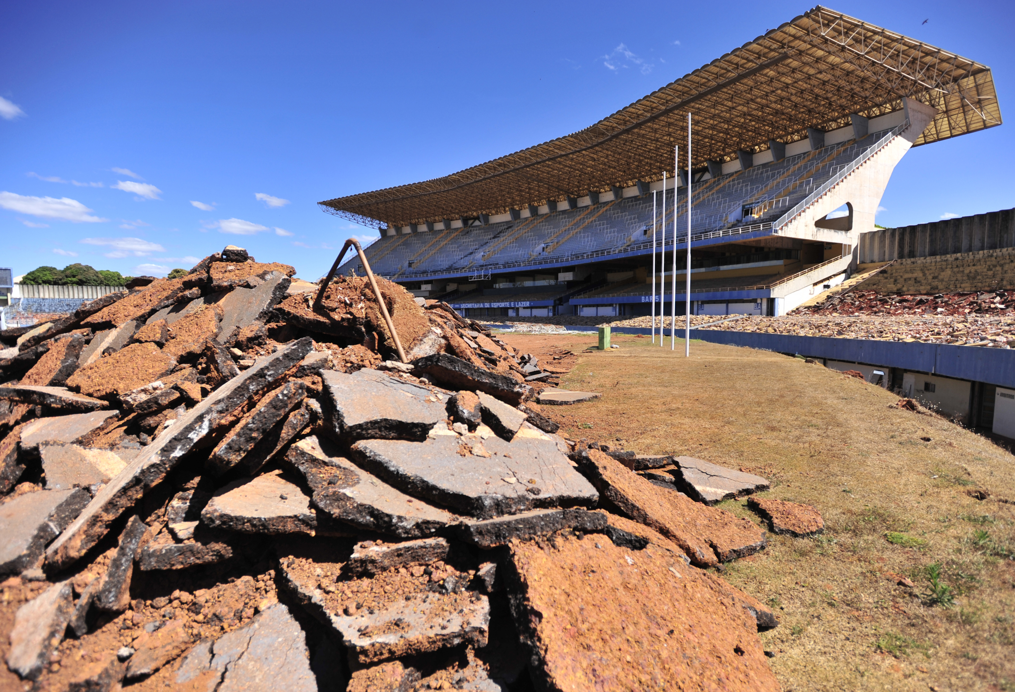 Brasília - Cerimônia de lançamento da reforma e ampliação do Estádio Nacional de Brasília Mané Garrincha.